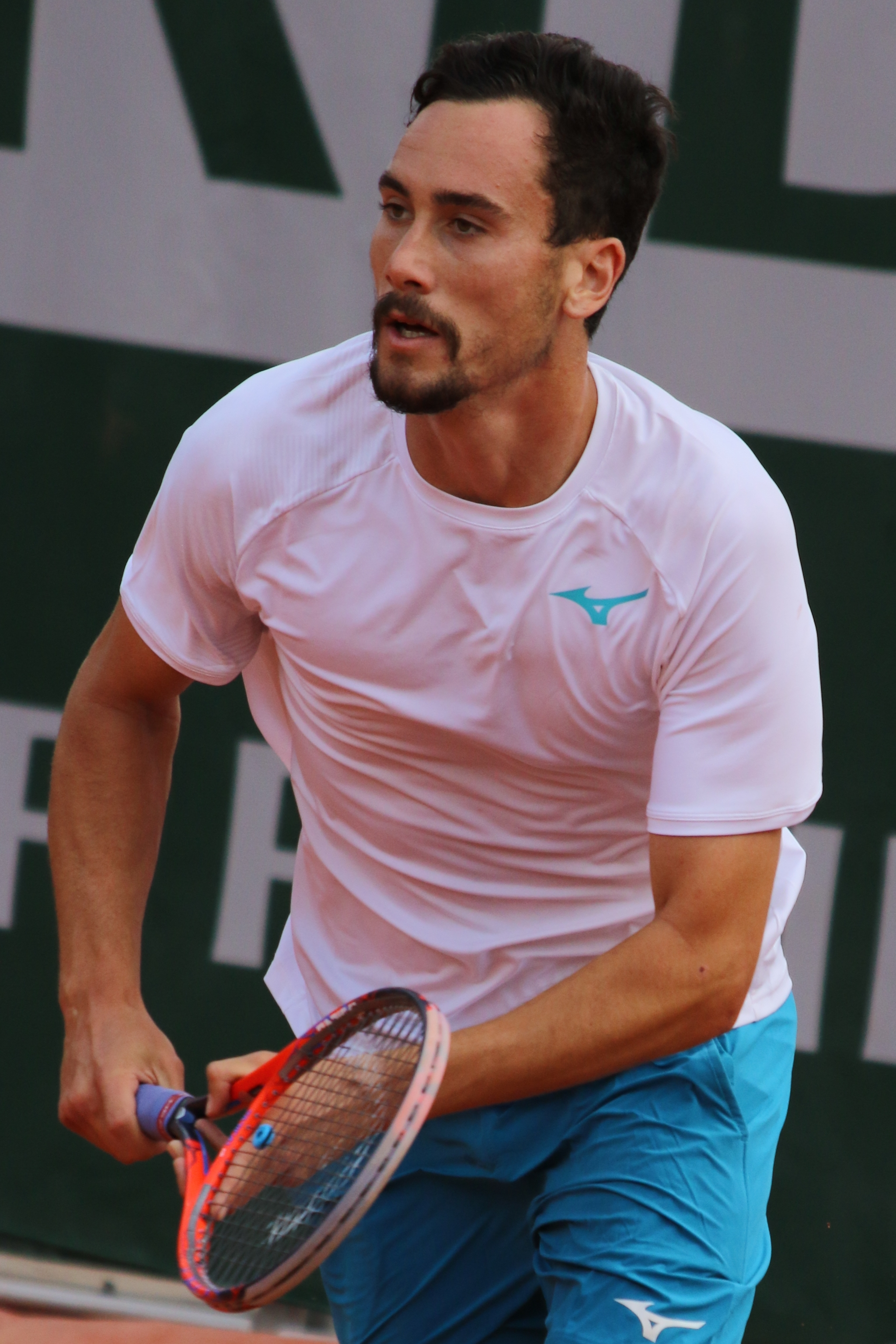 Mager RGQ19 (40)